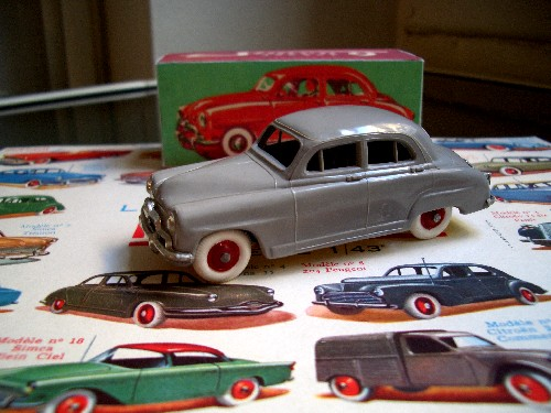 La première Norev 1/43ème